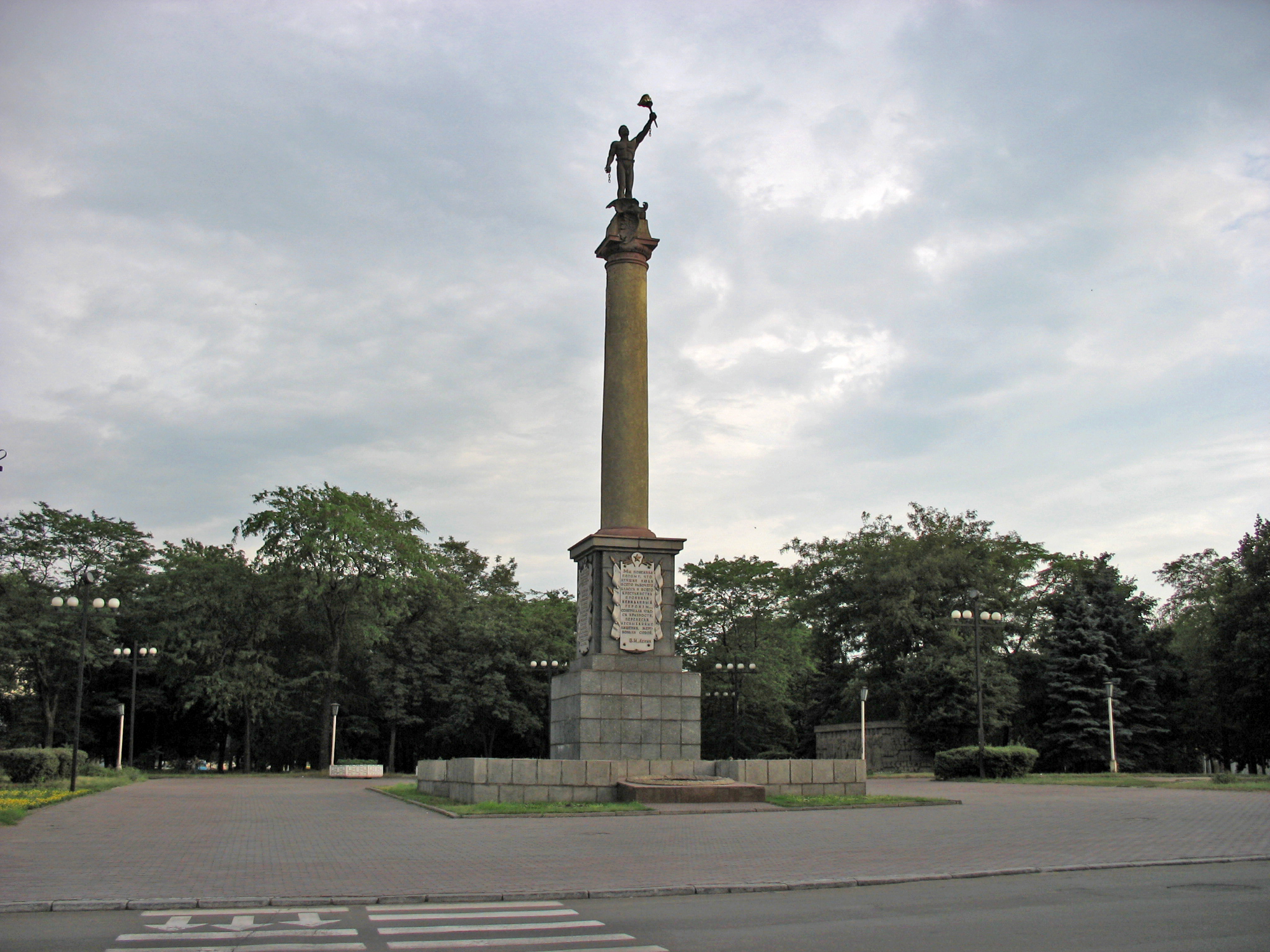 Братська могила борців революції, які загинули за владу Рад у 1918, 1919, 1925, 1926 рр. та радянських воїнів та підпільників, які загинули у 1943 році «Прометей». Поховано 37 чол., Дніпродзержинськ, на розі пр-тів Свободи та Гімназичного